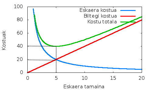 1:Eskaera tamaina ekonomikoa zehazteko kostuei buruzko grafikoak.